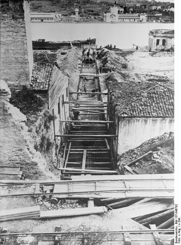 Europ[äische] Türkei, Instanbul, Ausmündung eines Hauptsammlers d. Stadtkanalisation ins Goldene Horn. Bauausf[ührung] Fa. Wayss u. Freytag.